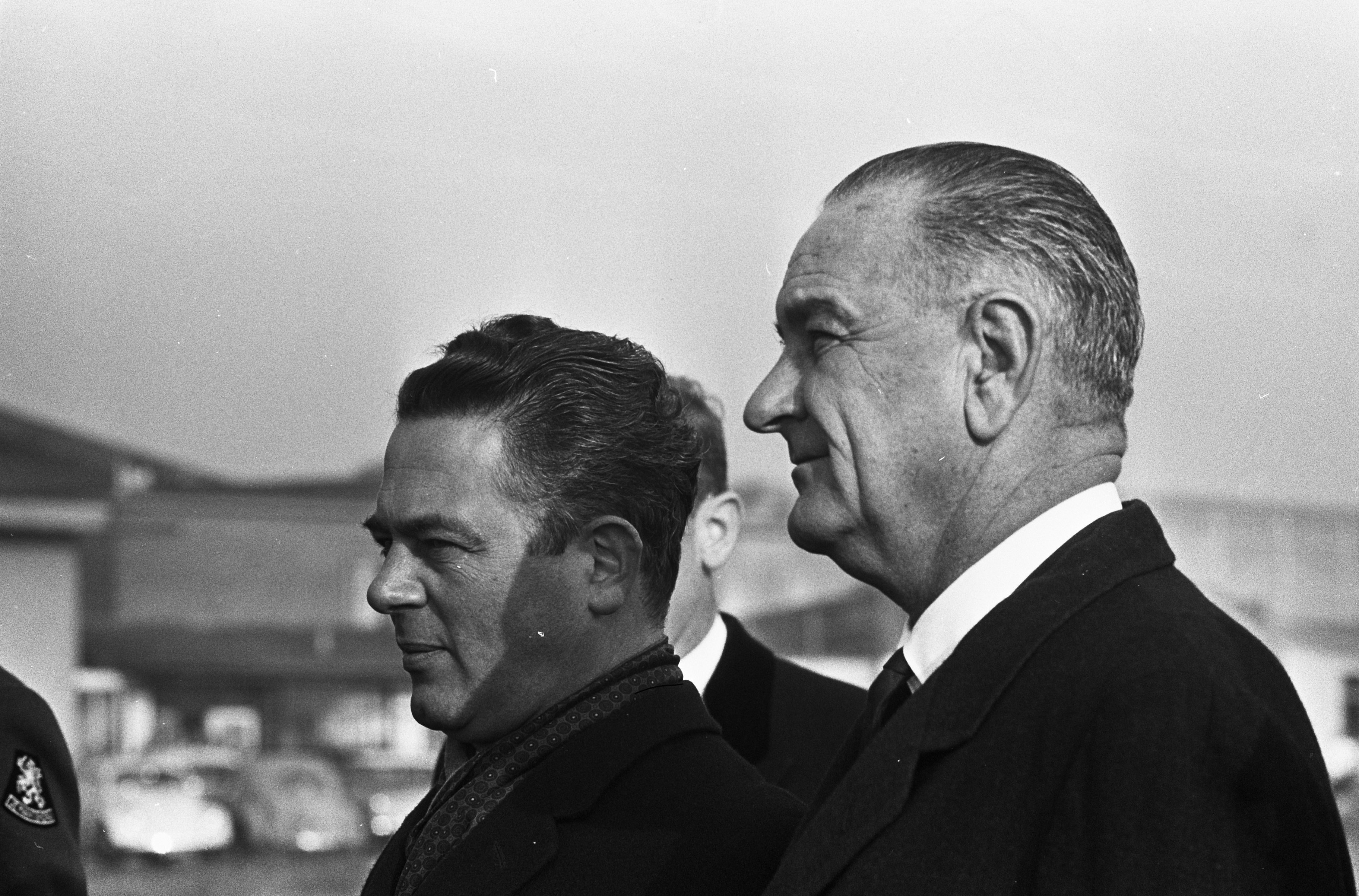 Collectie / Archief : Fotocollectie Anefo Reportage / Serie : [ onbekend ] Beschrijving : Lyndon B. Johnson in Holland. De vice-president en premier Marijnen op Ypenburg Datum : 5 november 1963 Locatie : Den Haag, Ypenburg, Zuid-Holland Trefwoorden : Vice-presidenten Persoonsnaam : Marijnen, Victor Fotograaf : Koch, Eric / Anefo Auteursrechthebbende : Nationaal Archief Materiaalsoort : Negatief (zwart/wit) Nummer archiefinventaris : bekijk toegang 2.24.01.05 Bestanddeelnummer : 915-7144